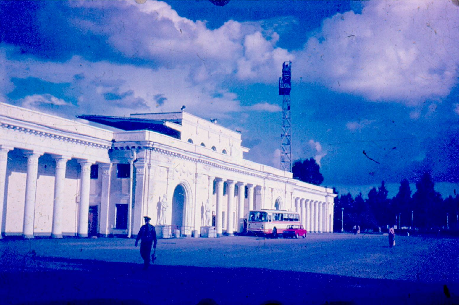 Стадион им Ленина Хабаровск лето 1980 года